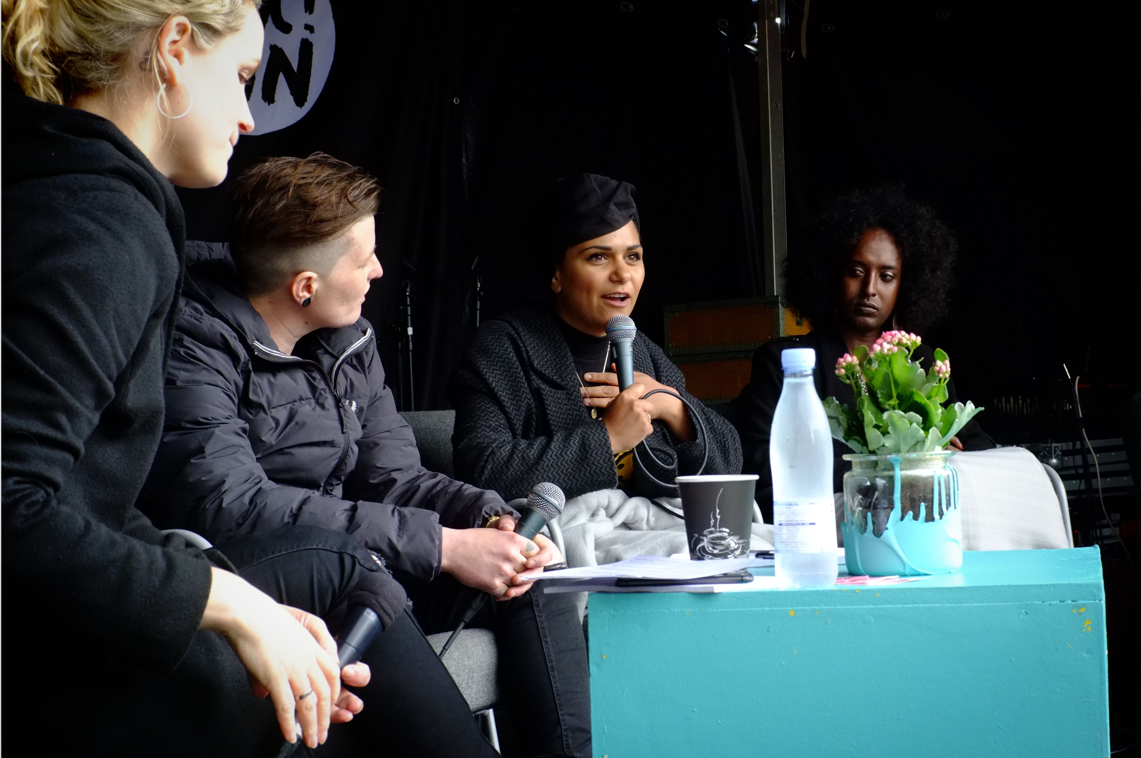 Panelet 'Søstersolidaritet' på Talk Town 2020. På billedet: Pernille Skipper, Mette Shak Dahlman, Natasha Al-Hariri, Moeisha Aden